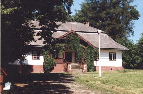 Jordanów - Dwór na Chrobaczem